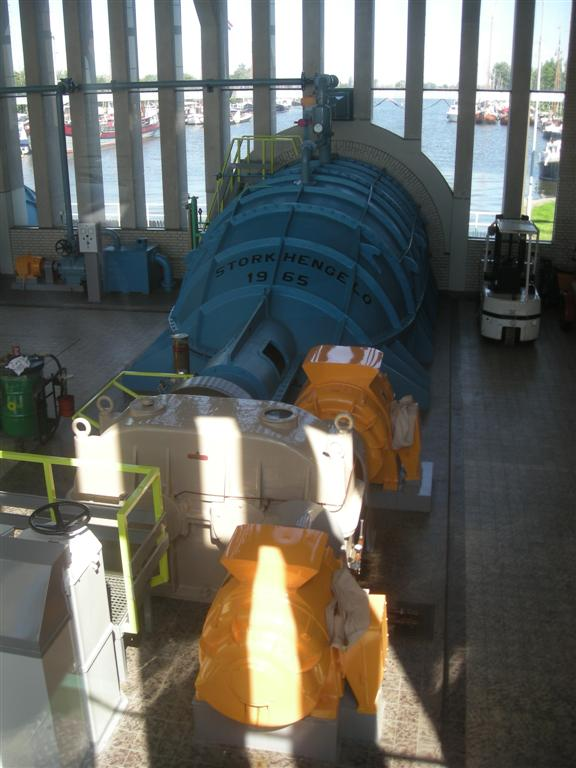 J.L. Hooglandgemaal bij Stavoren